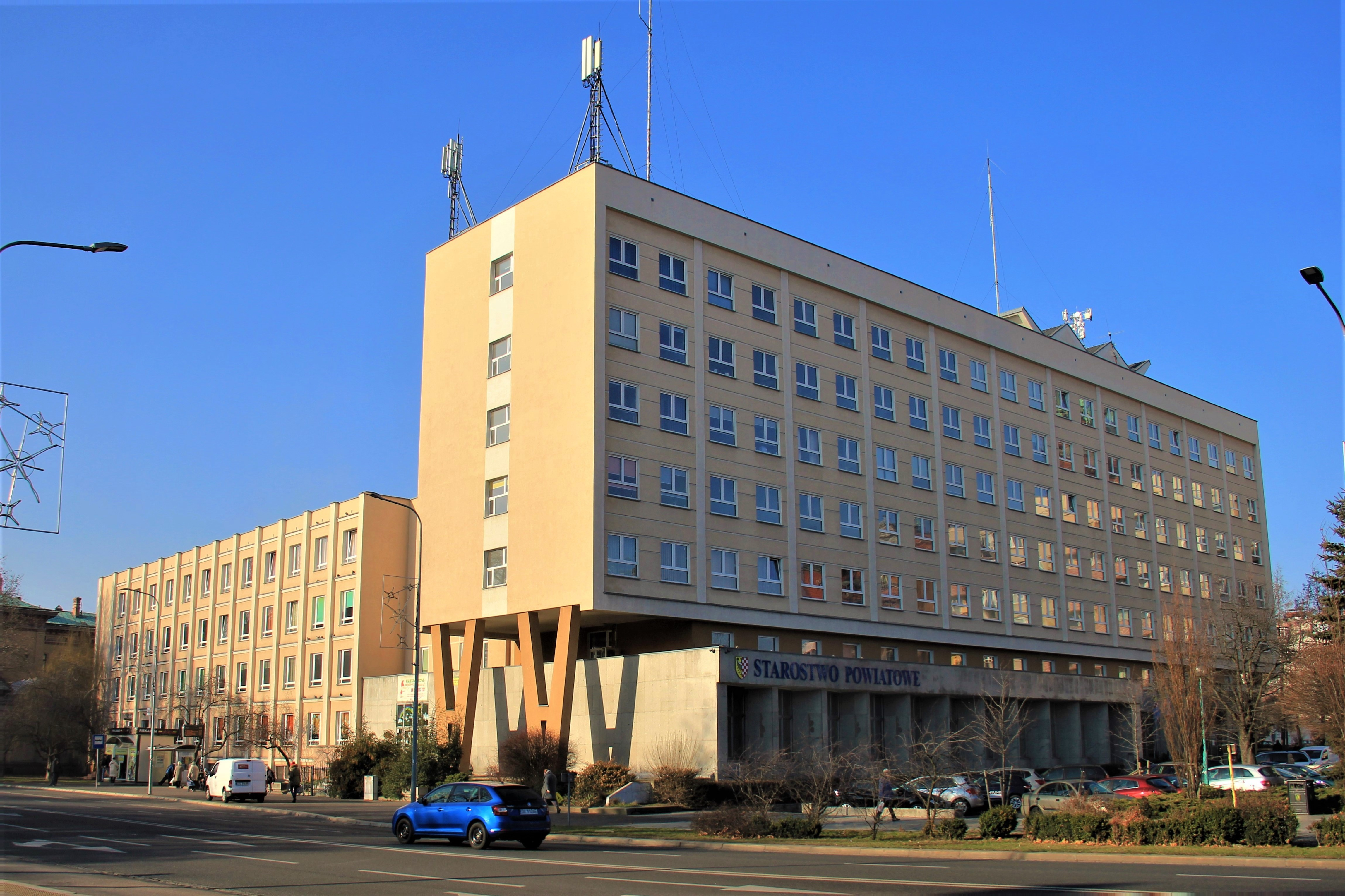 Budynek Starostwa Powiatowego w Legnicy. Widok z ulicy Fryderyka Skarbka